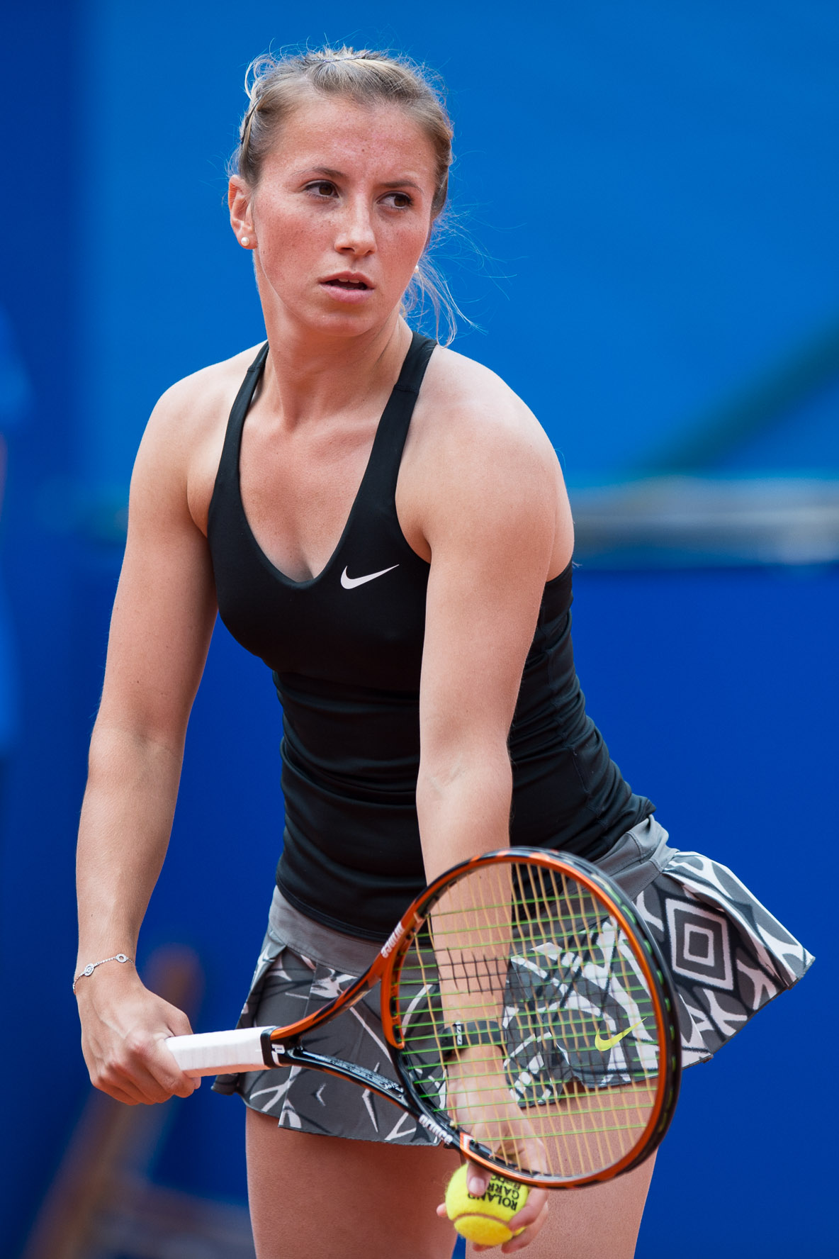 Annika Beck,Damentennis,Nürnberger Versicherungscup 2014,Tennis,WTA